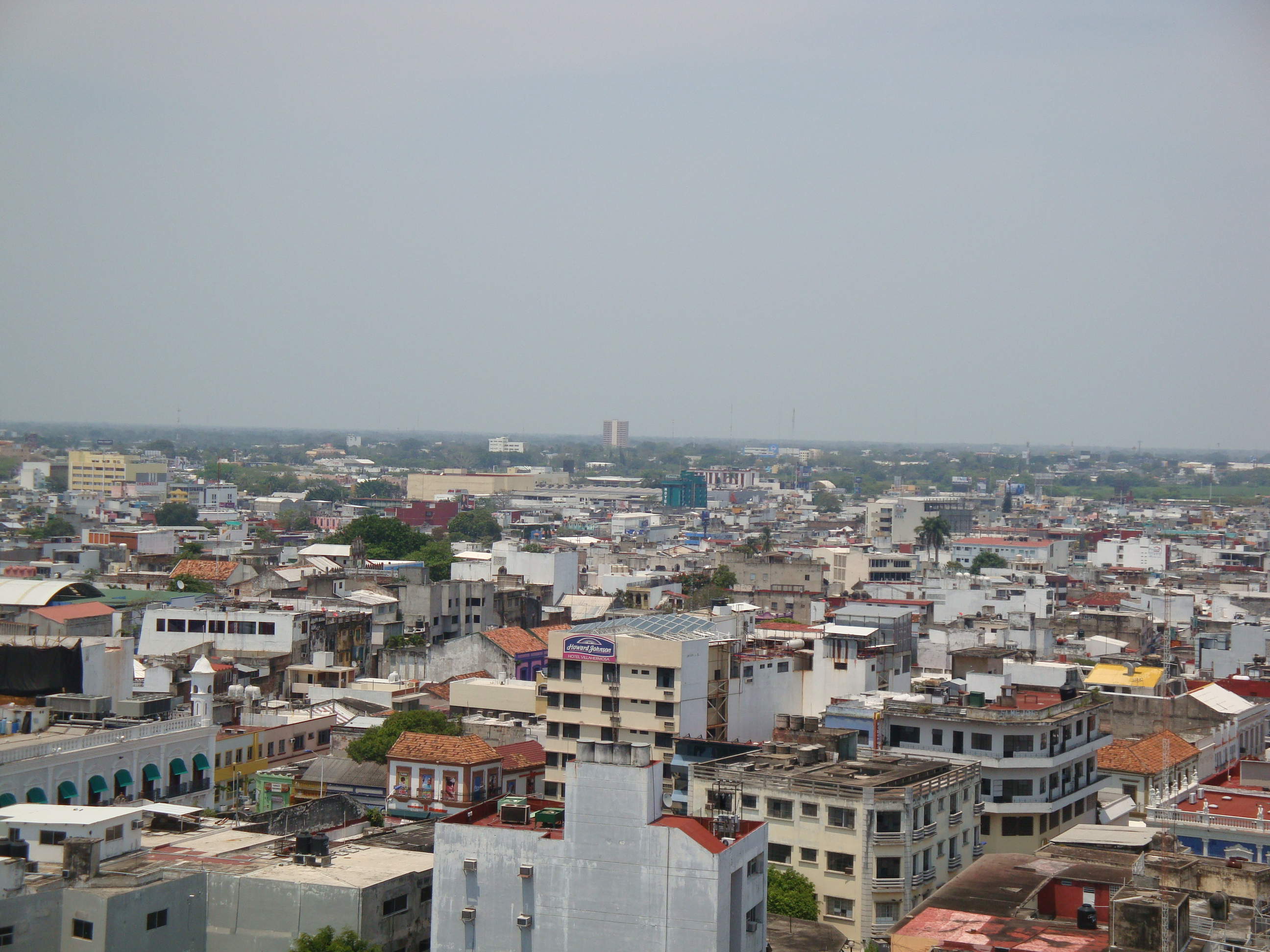 Panorámica norte de la Ciudad de Villahermosa, Tabasco, México. DESDE la "Torre del Caballero".